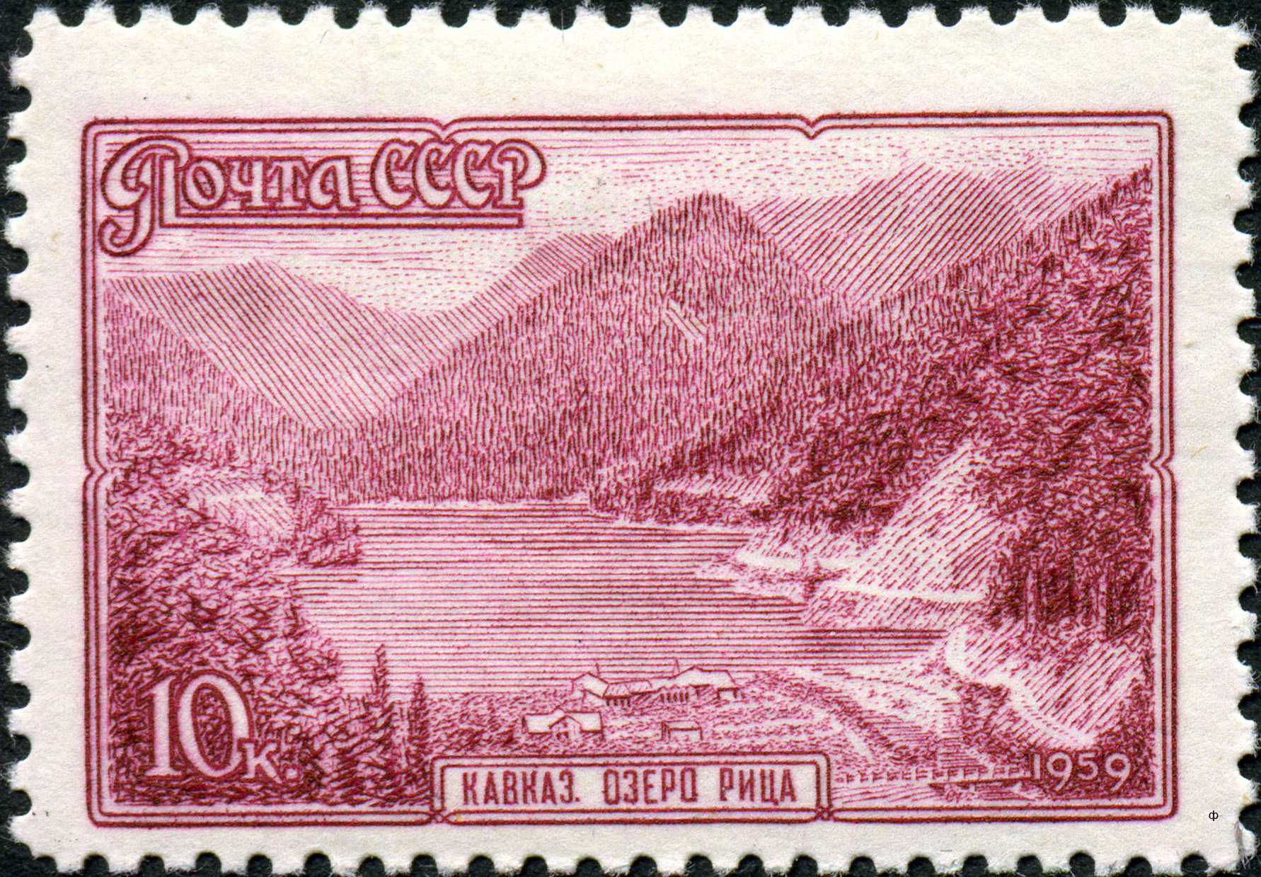 Марка СССР